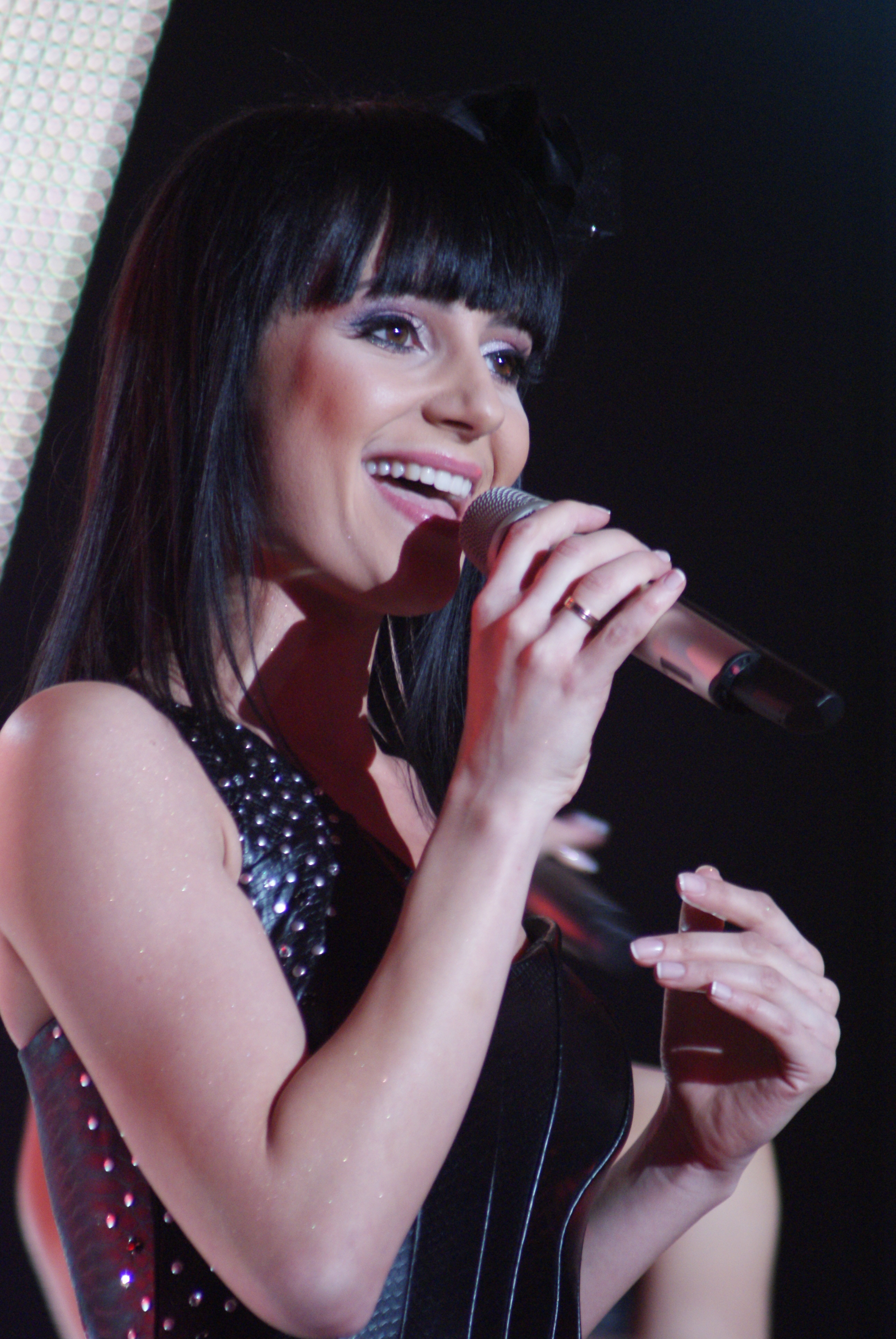 Aneta Figiel